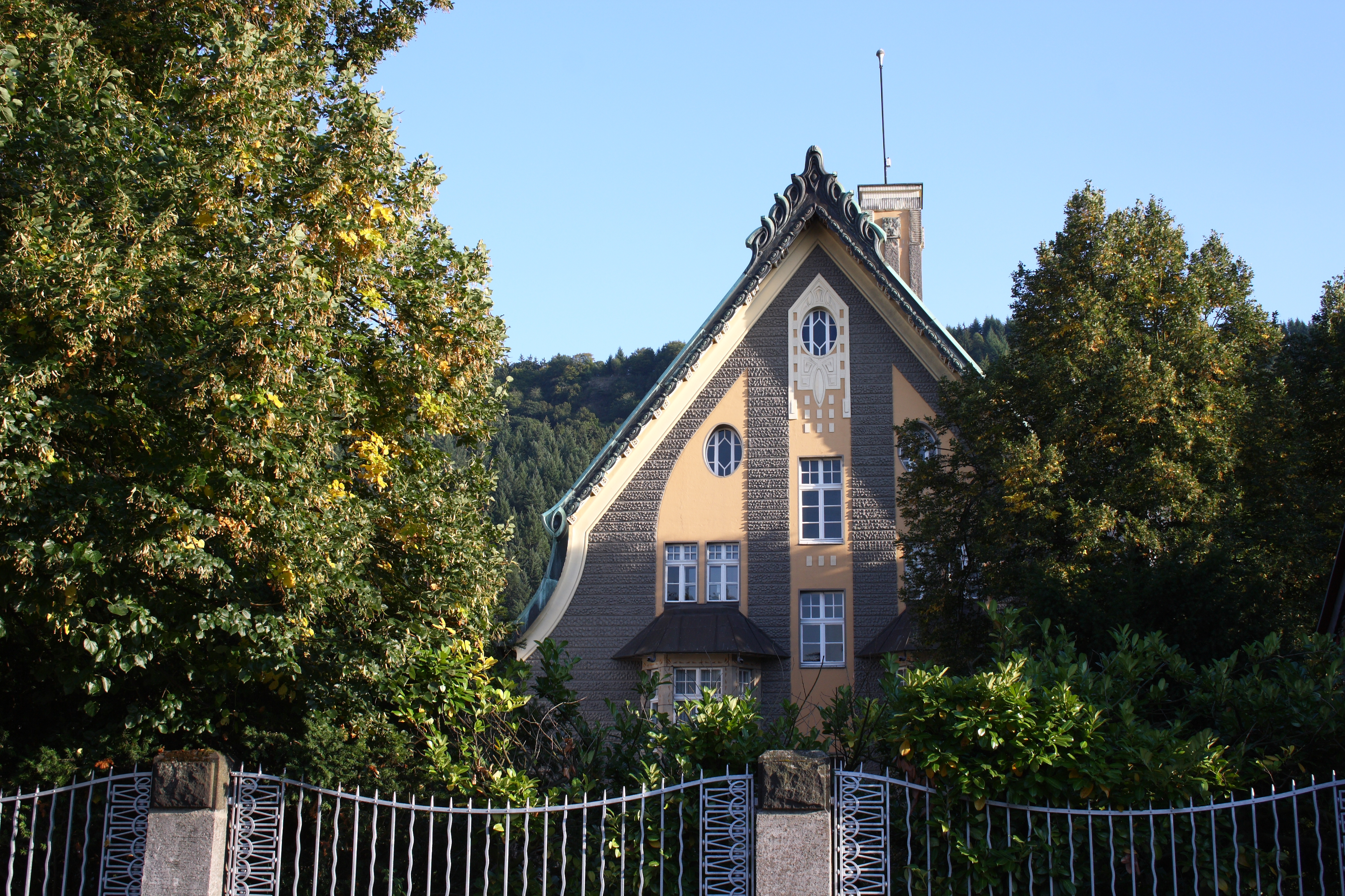 Haus Hüsgen in Traben, einem Ortsteil von Traben-Trarbach im Landkreis Bernkastel-Wittlich (Rheinland-Pfalz)